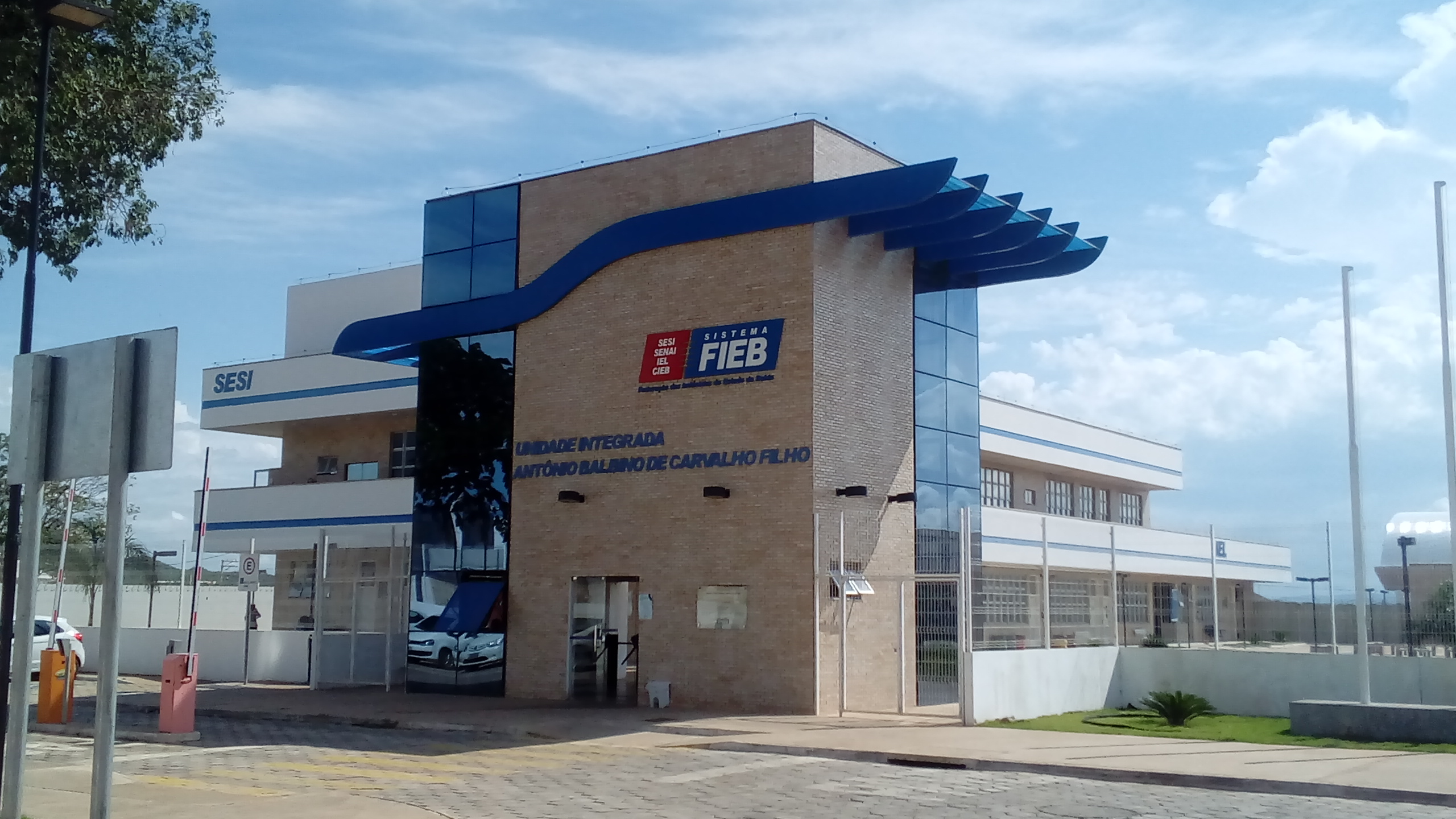 FIEB IEL SENAI...